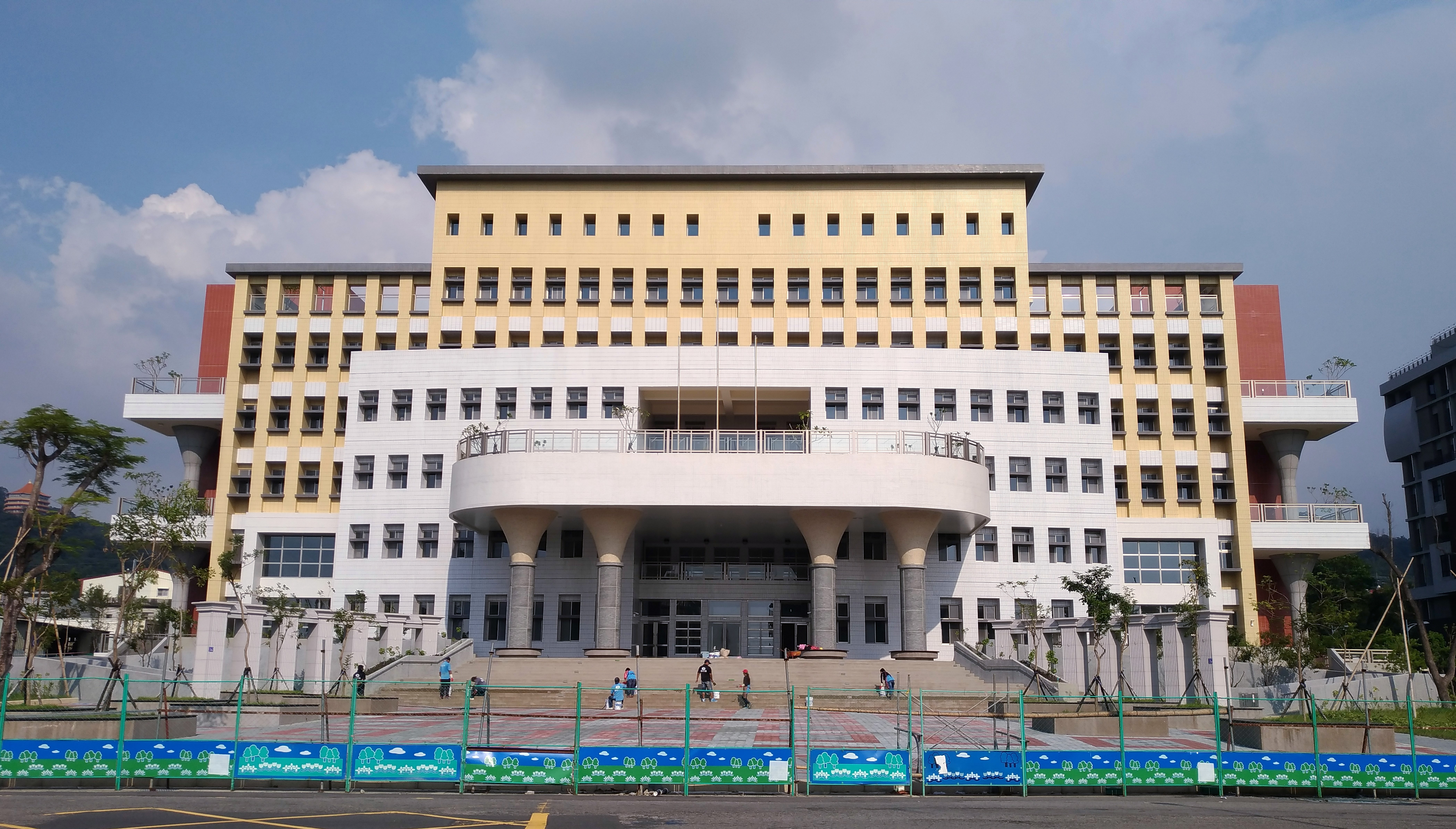 中文（台灣）: 臺中市潭子聯合辦公大樓